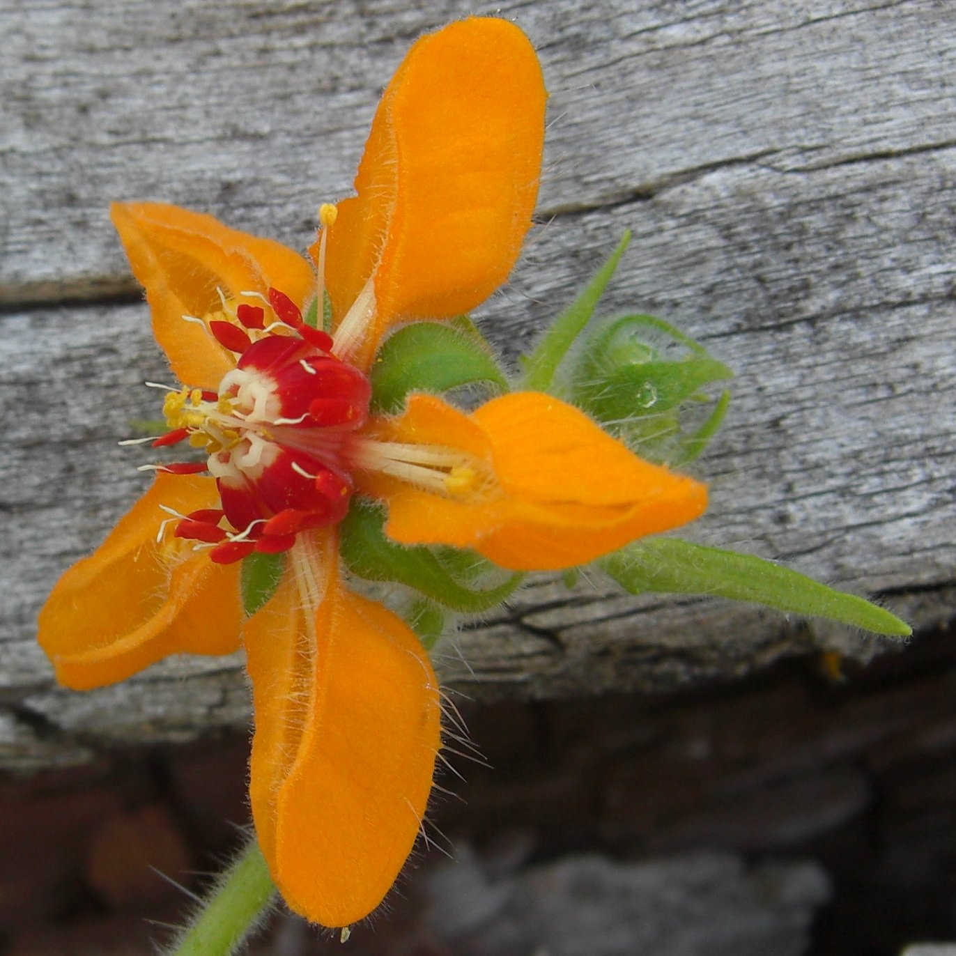 Loasa acerifolia Domb. ex Juss. 20081207.5 Parque Nacional Huerquehue, Chile